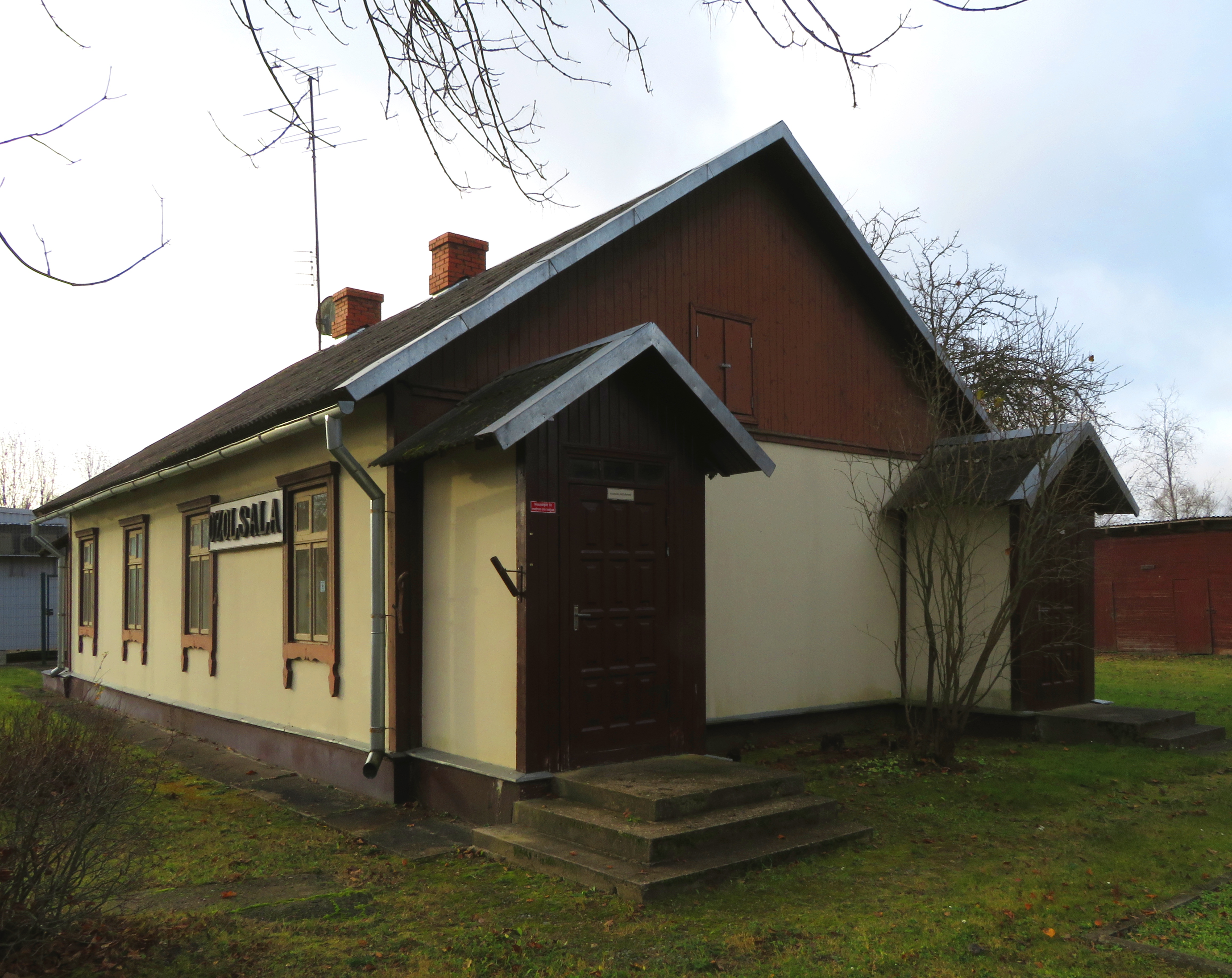 Ozolsalas stacijas ēka